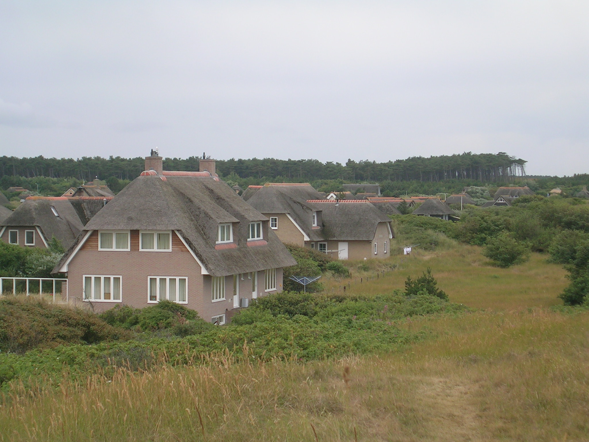 Ameland typische Häuser_bei_Nes